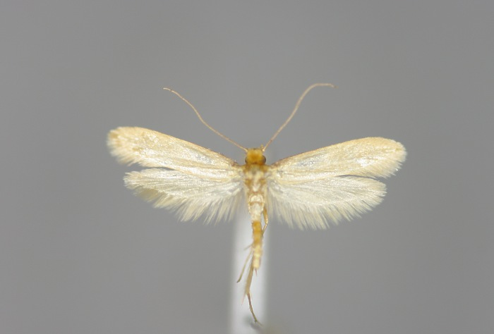 Tineola bisselliella